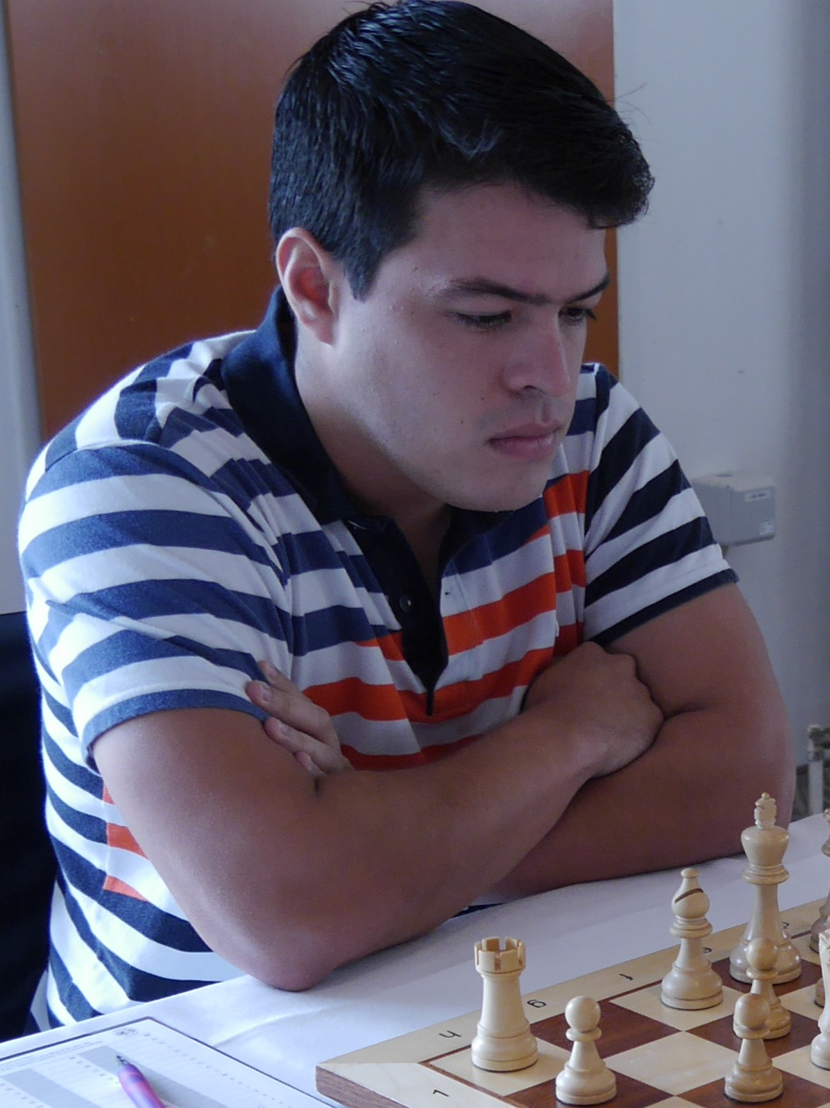 Eduardo Pat Iturrizaga Bonelli, ZMDI Schachfestival 2016 in Dresden.